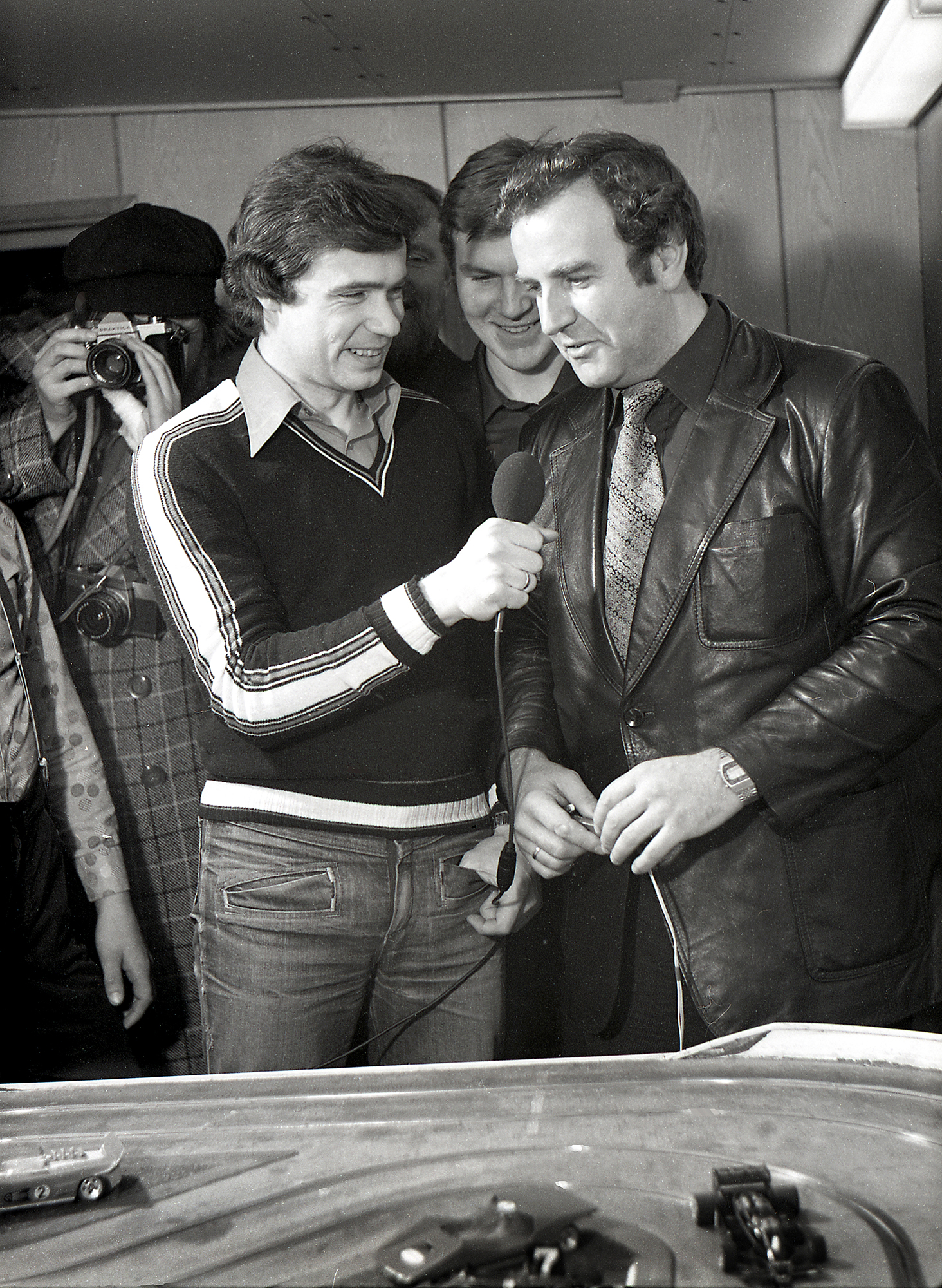 Kalev Vapper ja Eedo Raide 80